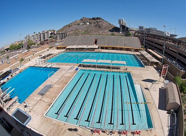 Mona Plummer Aquatic Center (6)